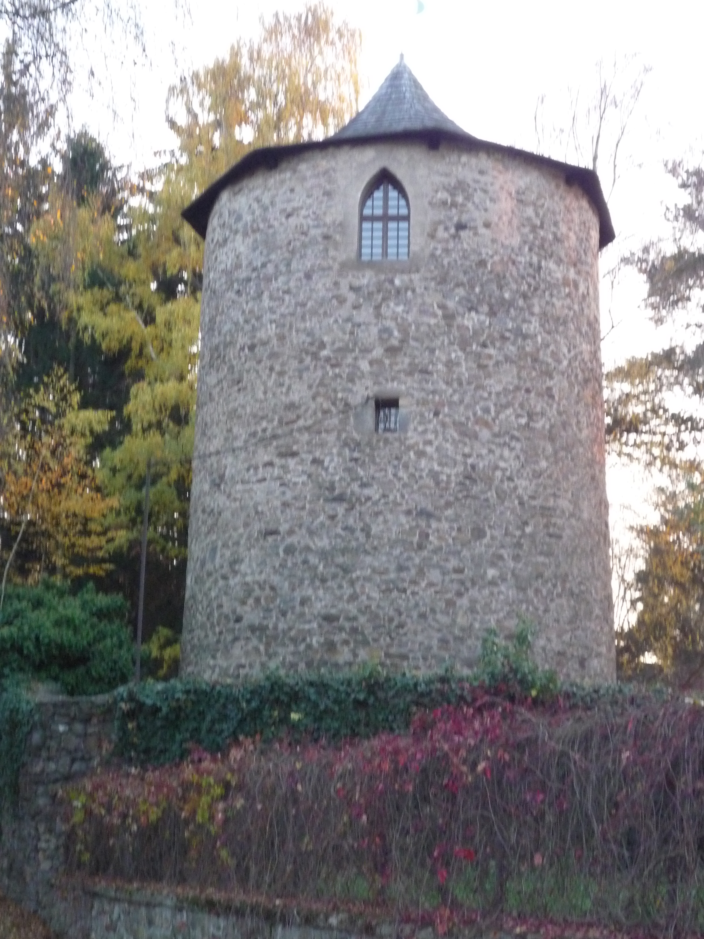 Autor fotografie Jiří Zelenka. Toulky Vysočinou. Opevnění Smilova Brodu - Havlíčkův Brod